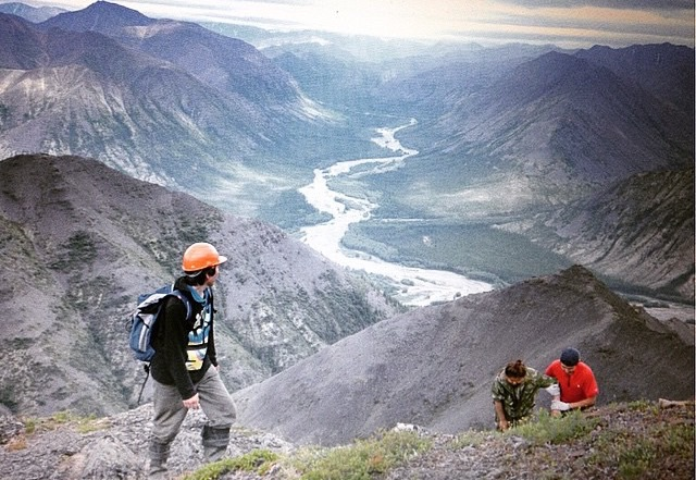 Сунтар-Хаята, Томпонский район